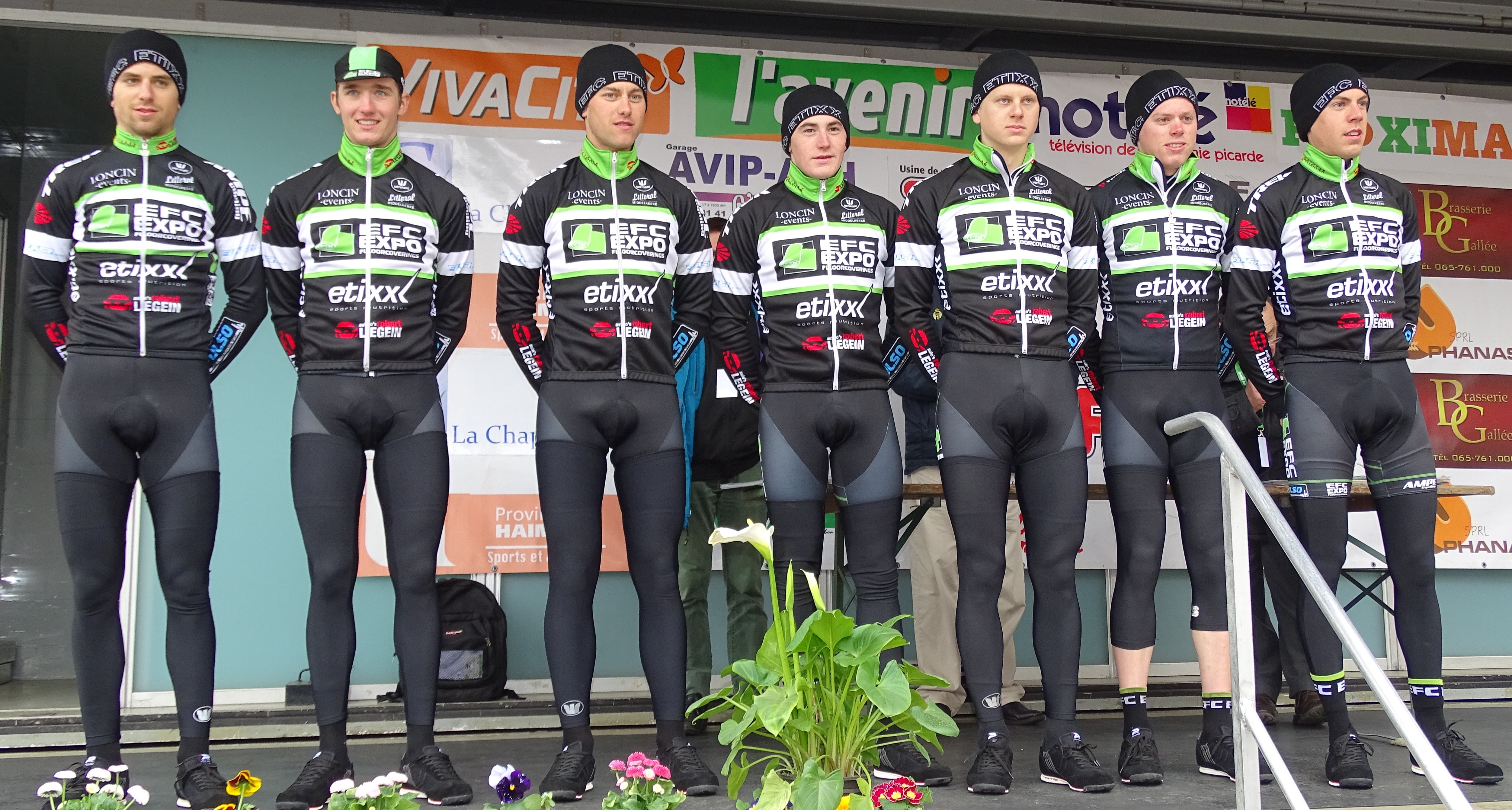 Triptyque des Monts et Châteaux 2015 Depicted team: EFC-Etixx